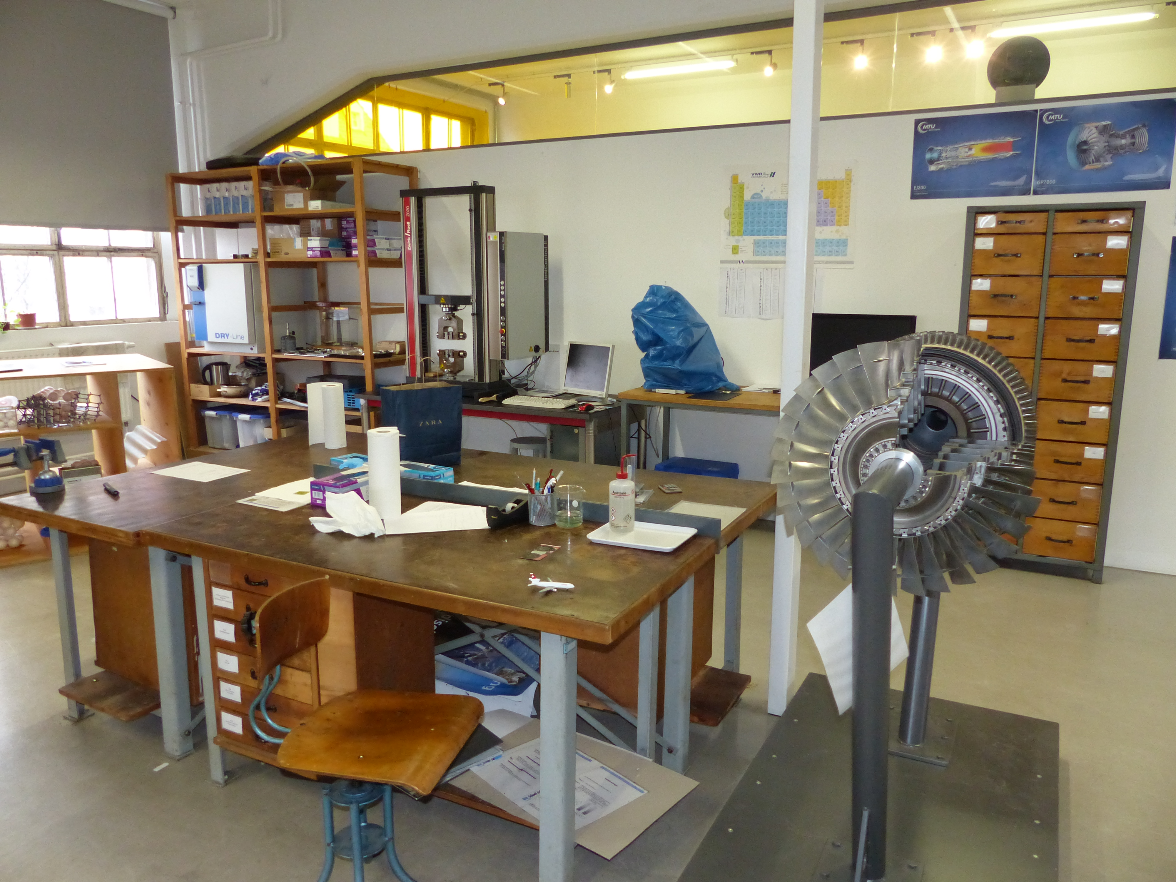 DLR School Lab Dresden, in den Technischen Sammlungen Dresden